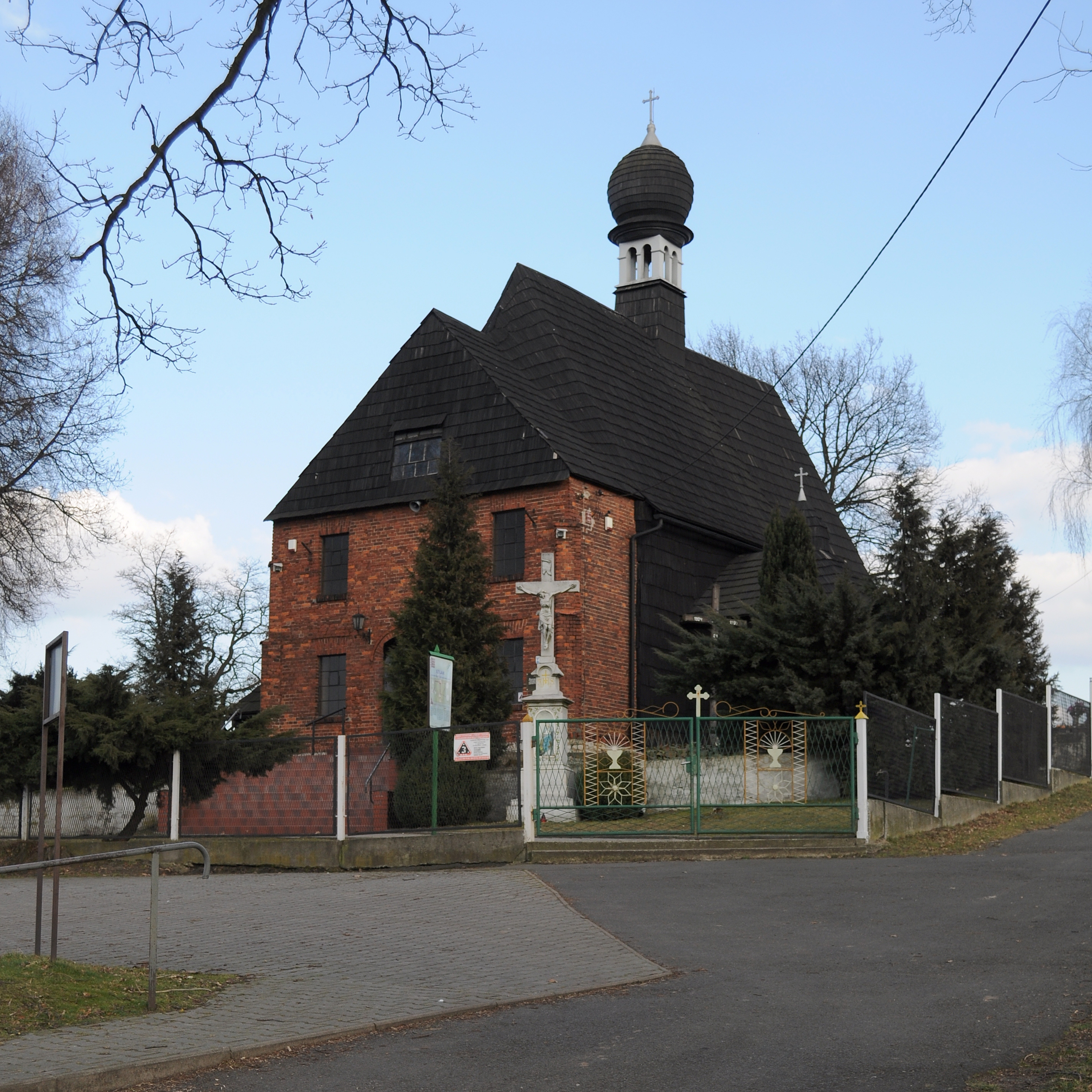 Księży Las. Kościół św Michała Archanioła